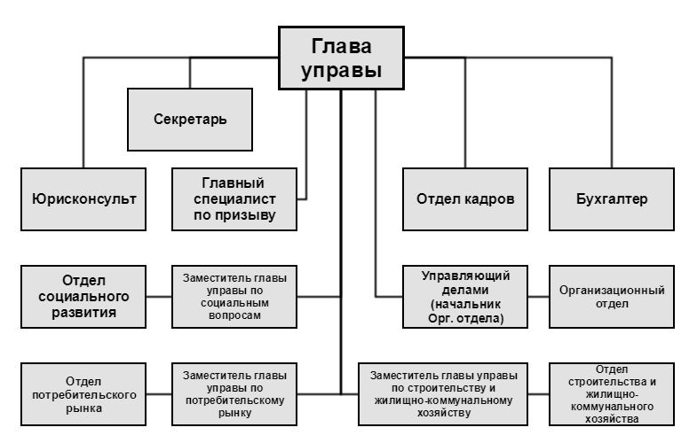 Схема управы Тропарёво-Никулино (на основе аналогичной схемы в книге «Летописная тетрадь района Тропарево–Никулино»)